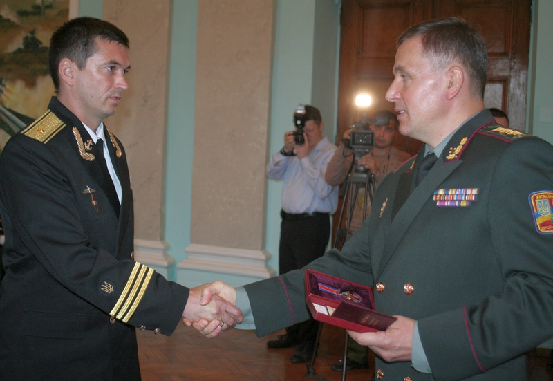 Награждение Юрия Федаша